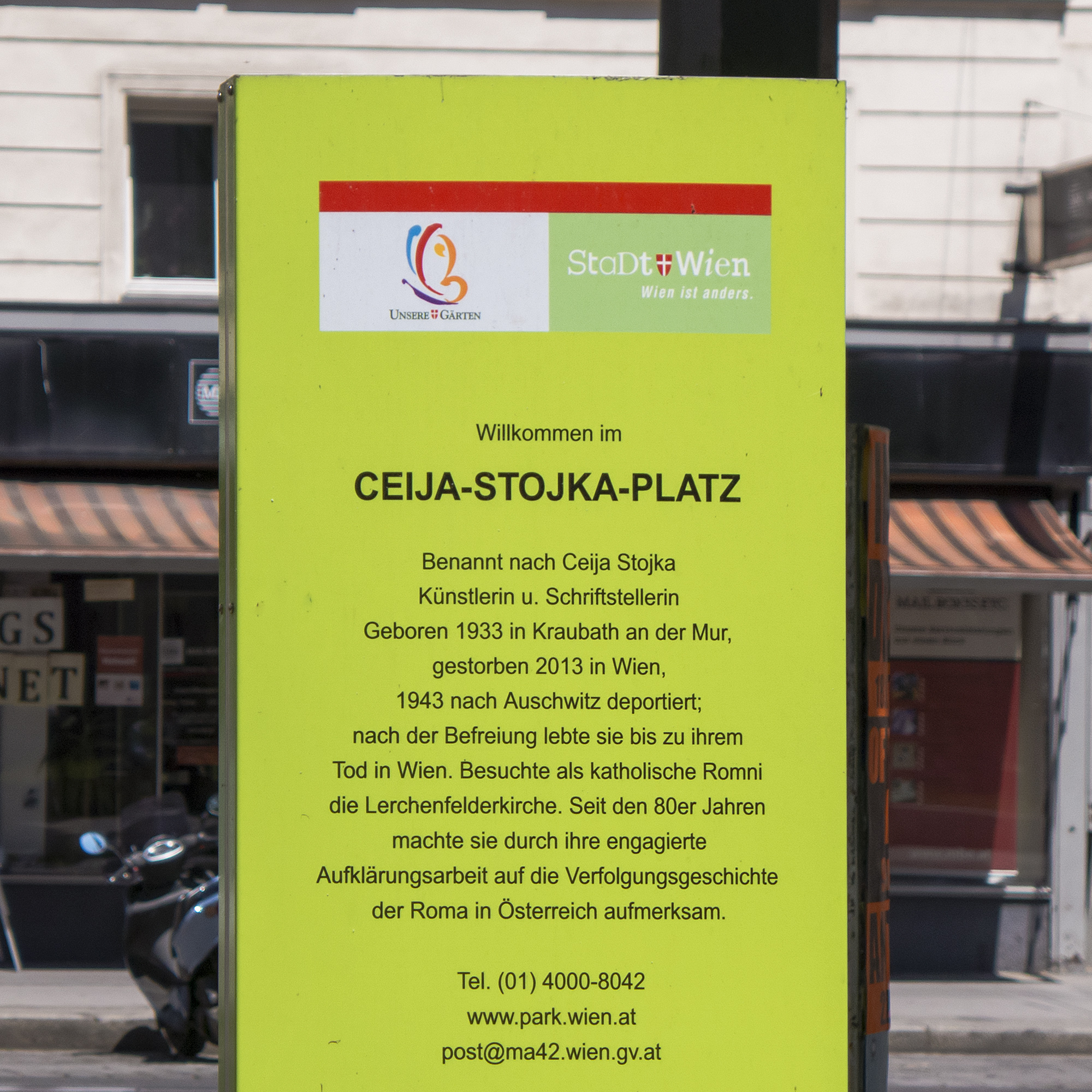 Ceija-Stojka-Platz in Wien 7